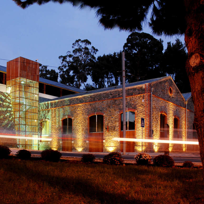 Fotografia do Edifício da Oficina da Ciência de Sintra